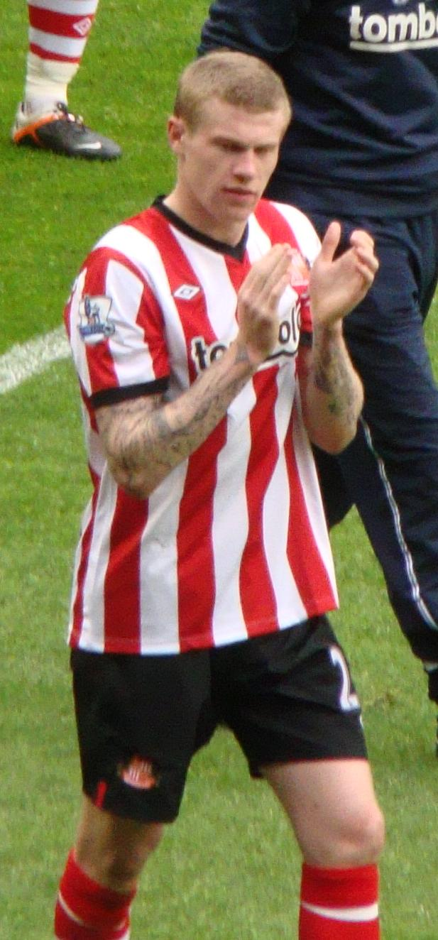 SAFC squad 2011/12